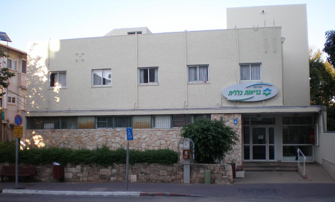 מרפאת "גוטפריד" של שירותי בריאות כללית בהרצליה. צילם דוד שי.